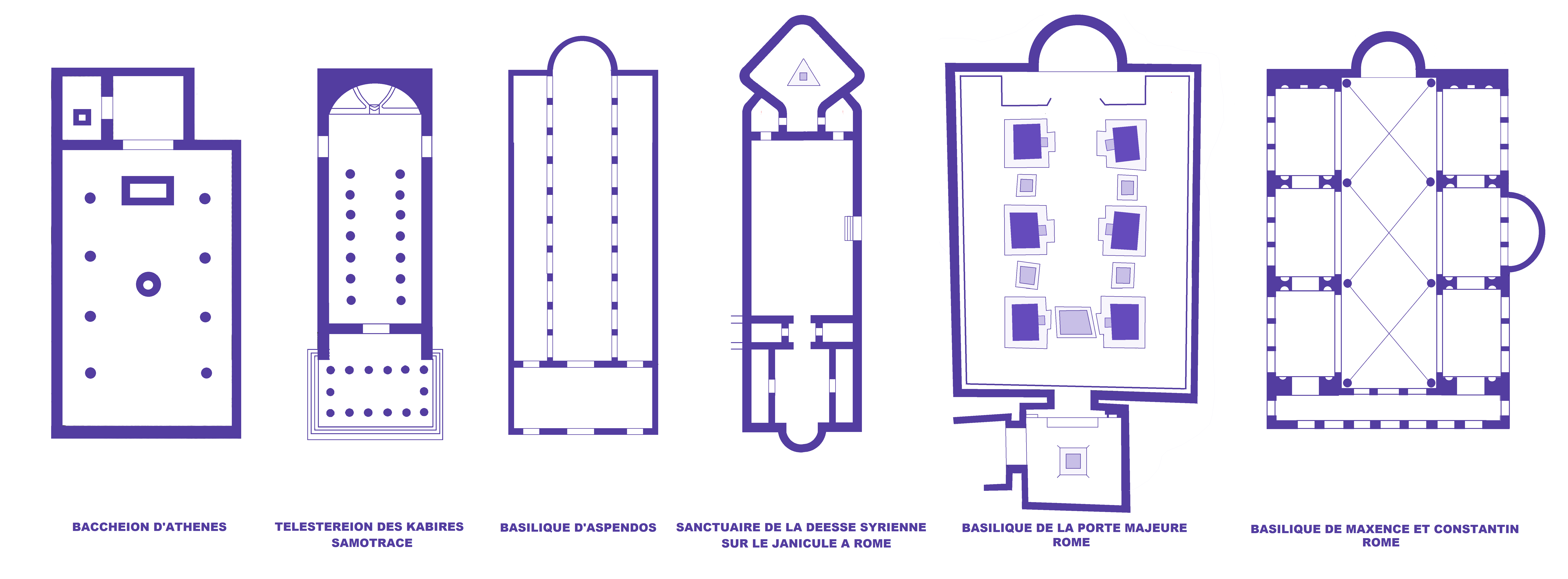 Origines des basiliques chrétiennes